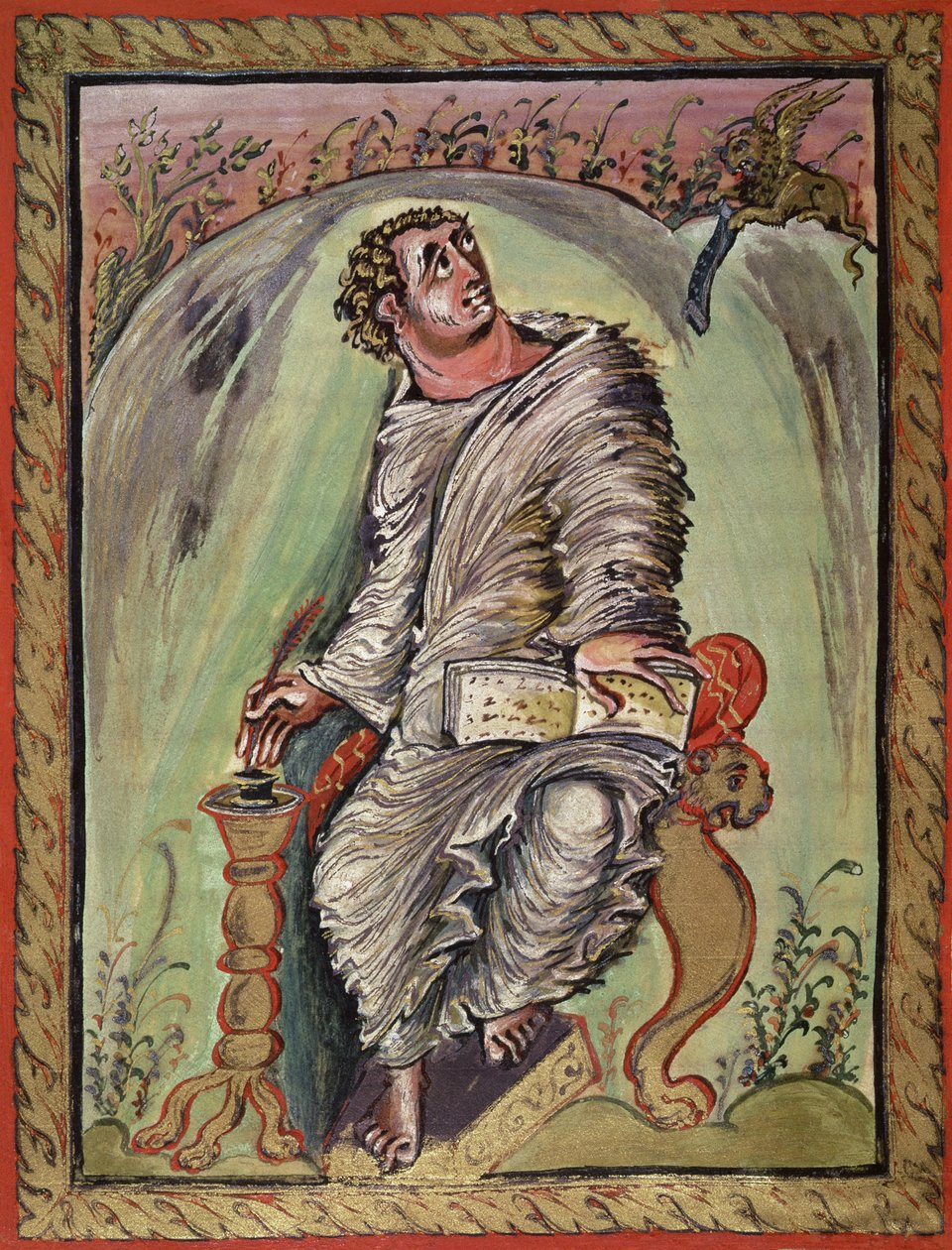 Description: Saint. Marc du livre de l'Evangile de l'archevêque Ebbon de Reims, 815 - 835 A.D. Encre et couleurs sur vellin, 10 1/4" X 8 3/16". (Epernay, Bibliotheque, Municipale, MS 1, fol. 18v)